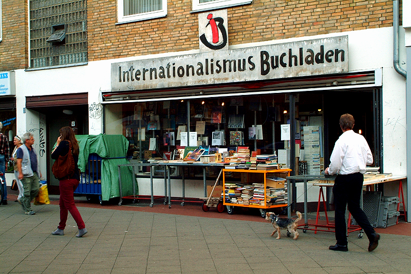 Zum Zeitpunkt der Aufnahme hatte der beinahe alteingesessene Internationalismus Buchladen unter der Adresse Engelbosteler Damm 4 noch keinen eigenen Internetauftritt. Inhaber Arno Kundlatsch der den menschlichen, persönlichen Kontakt zu seinen Kunden schätzt, will ums Überleben der der im verschwindenen Buchkultur kämpfen. Das Schild über dem Schaufenster des 2001 an den "E-Damm" gezogenen Antiquariats stammt von dem Künstler Jorge La Guardia ...